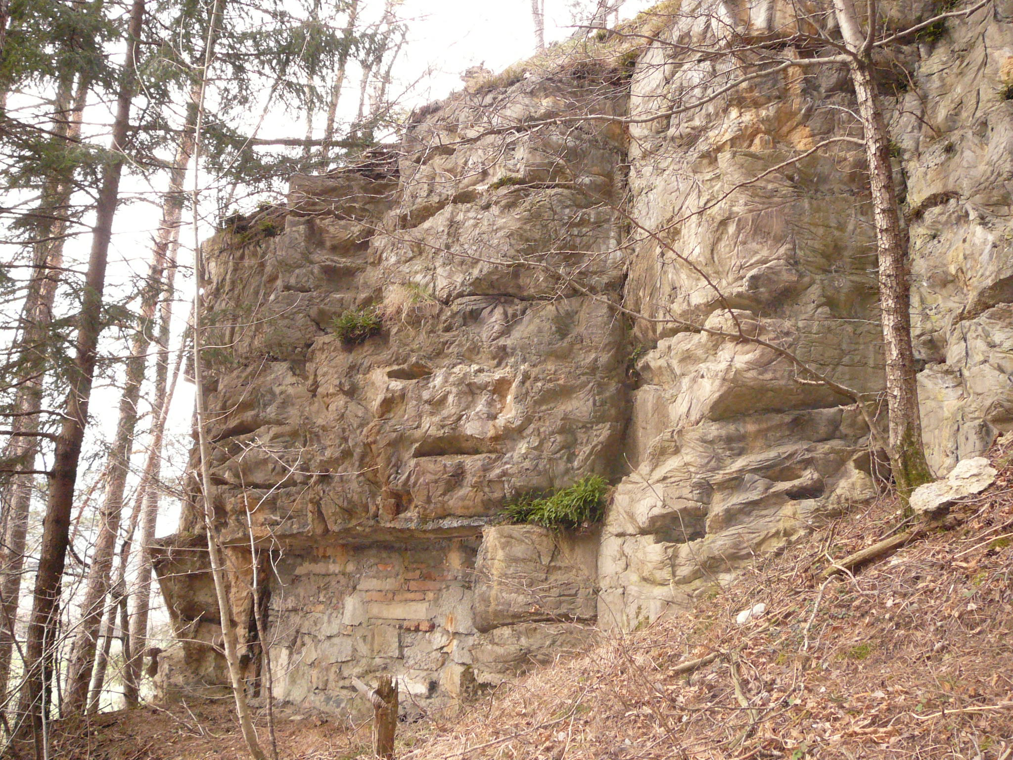 Opera_34 Sciaves